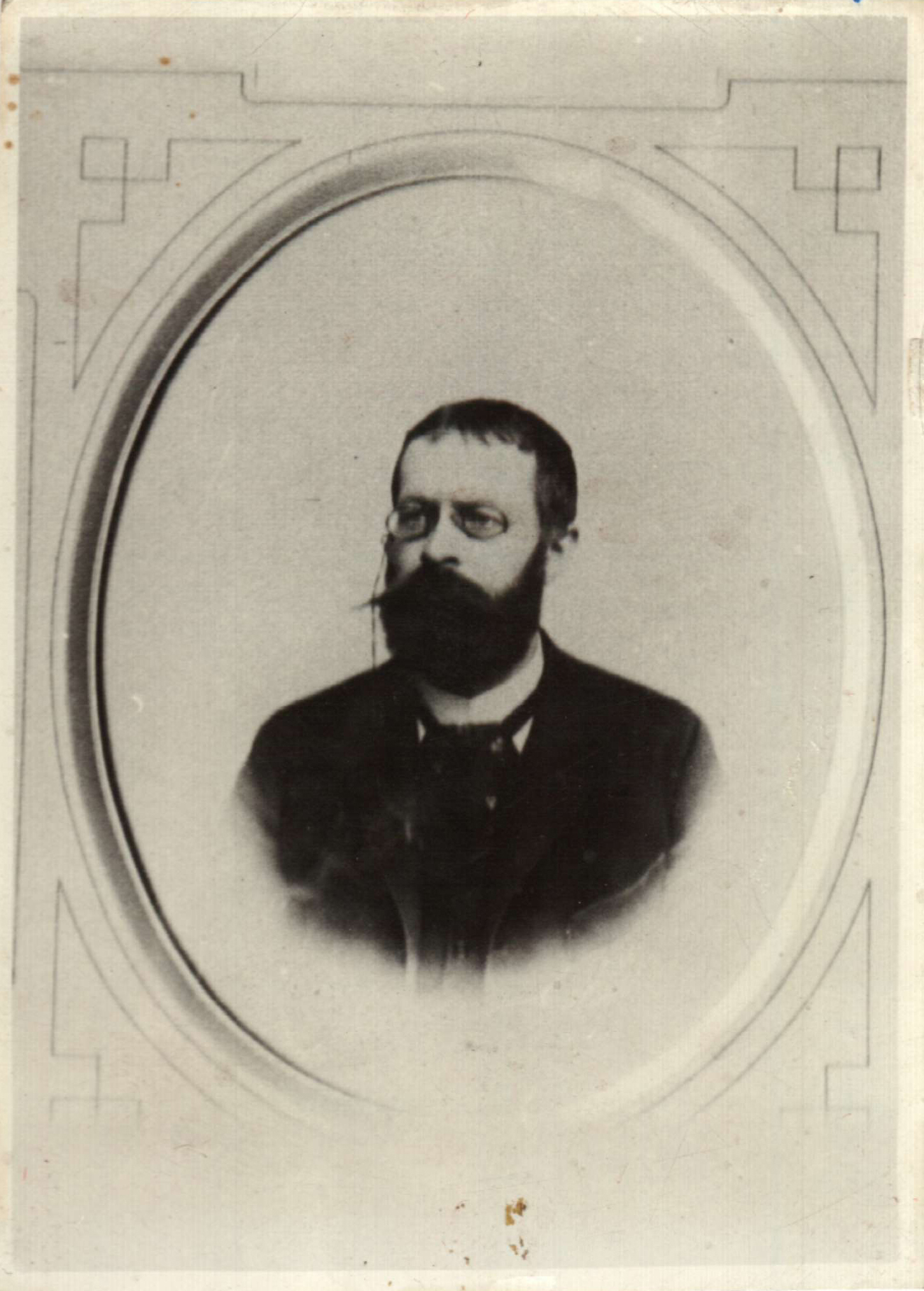 JUDr. Romuald Dubový (1856 Šumvald - 1896 Opava)